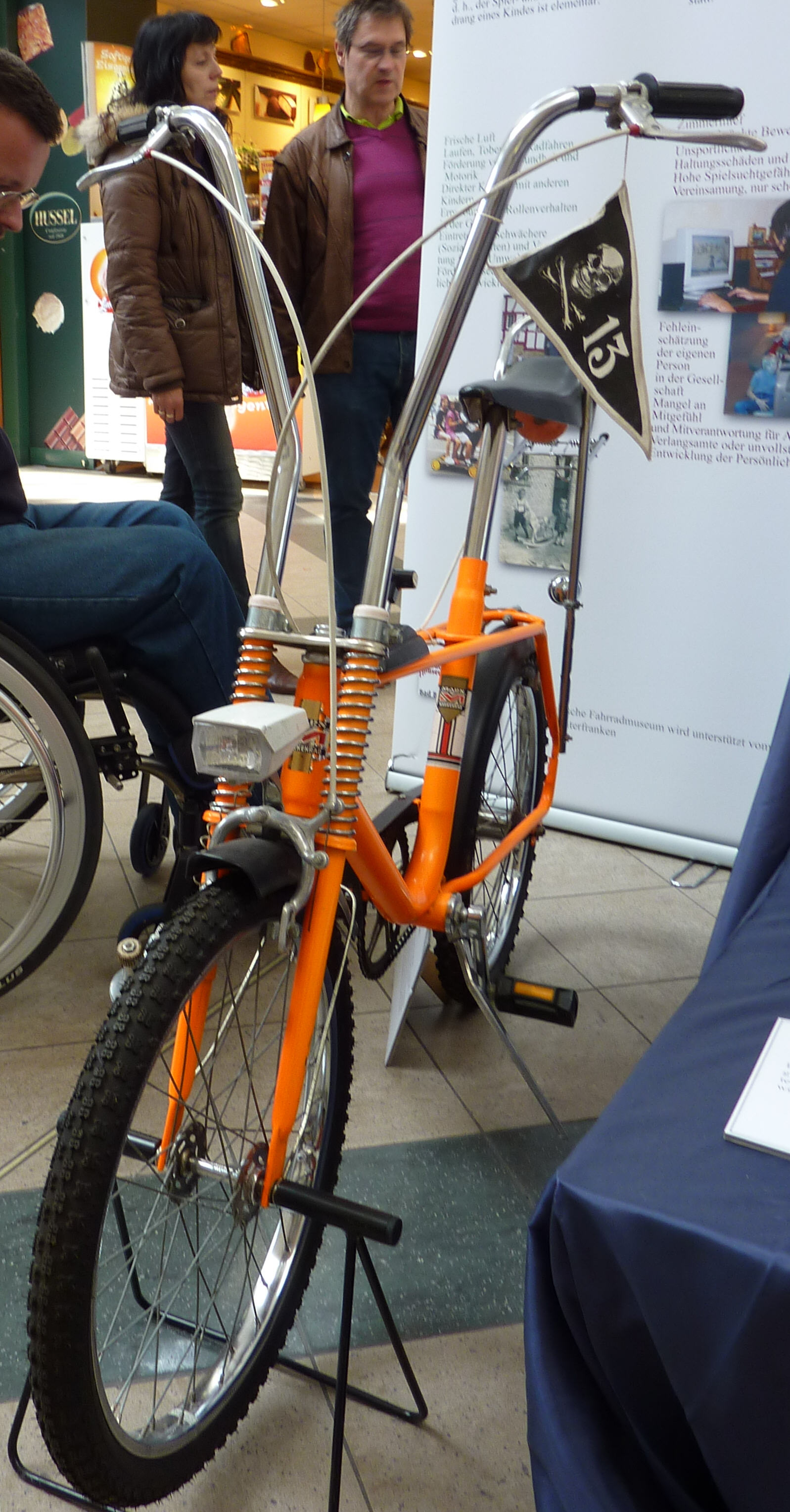 Bonanzarad